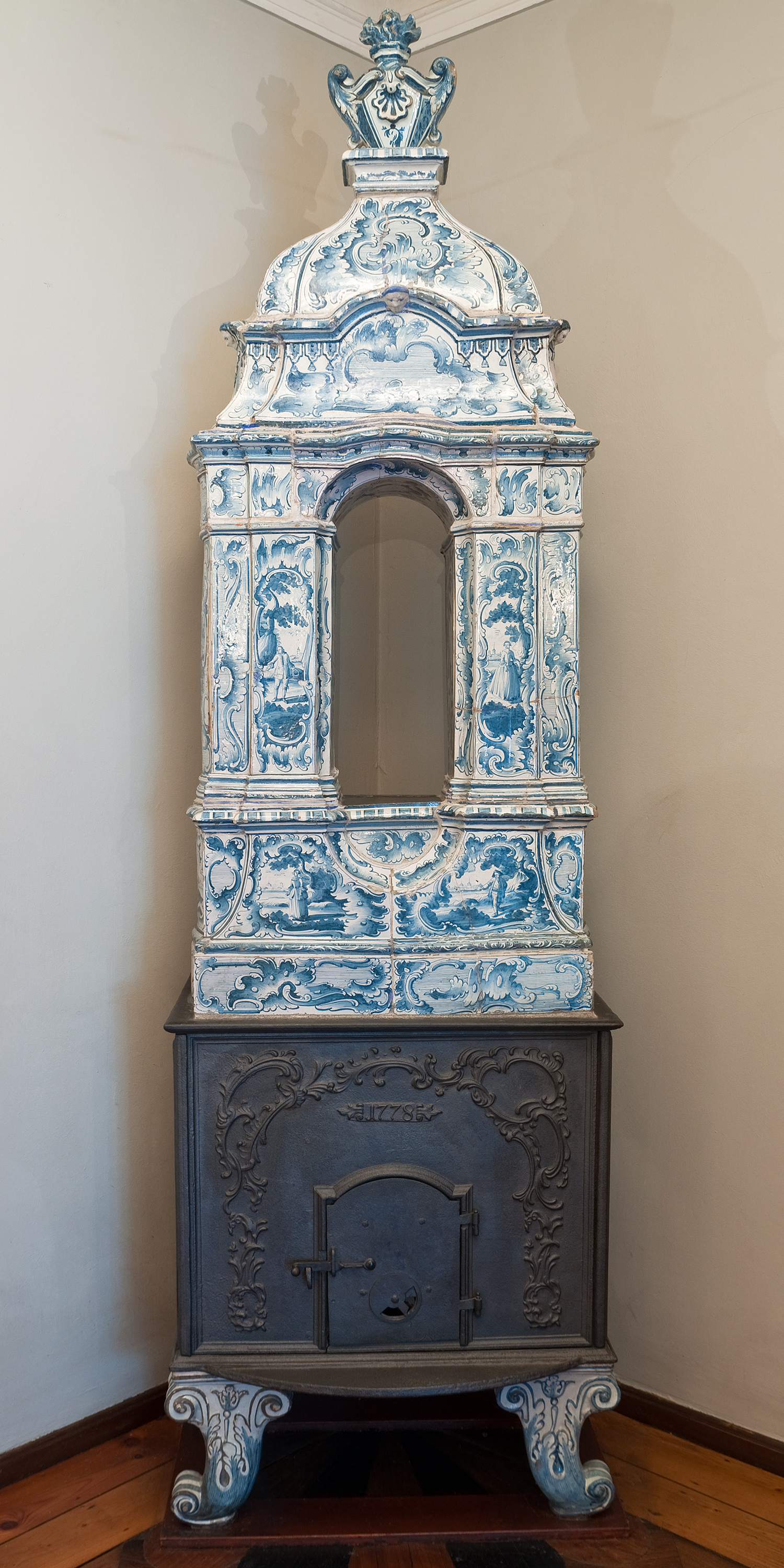 Aufsatzofen aus de Jahre 1778. Dieser Ofen stammt aus einem Haus in der Holländische Reihe 11, Hamburg. Fotografiert im Museum für Hamburgische Geschichte, Hamburg, Deutschland.